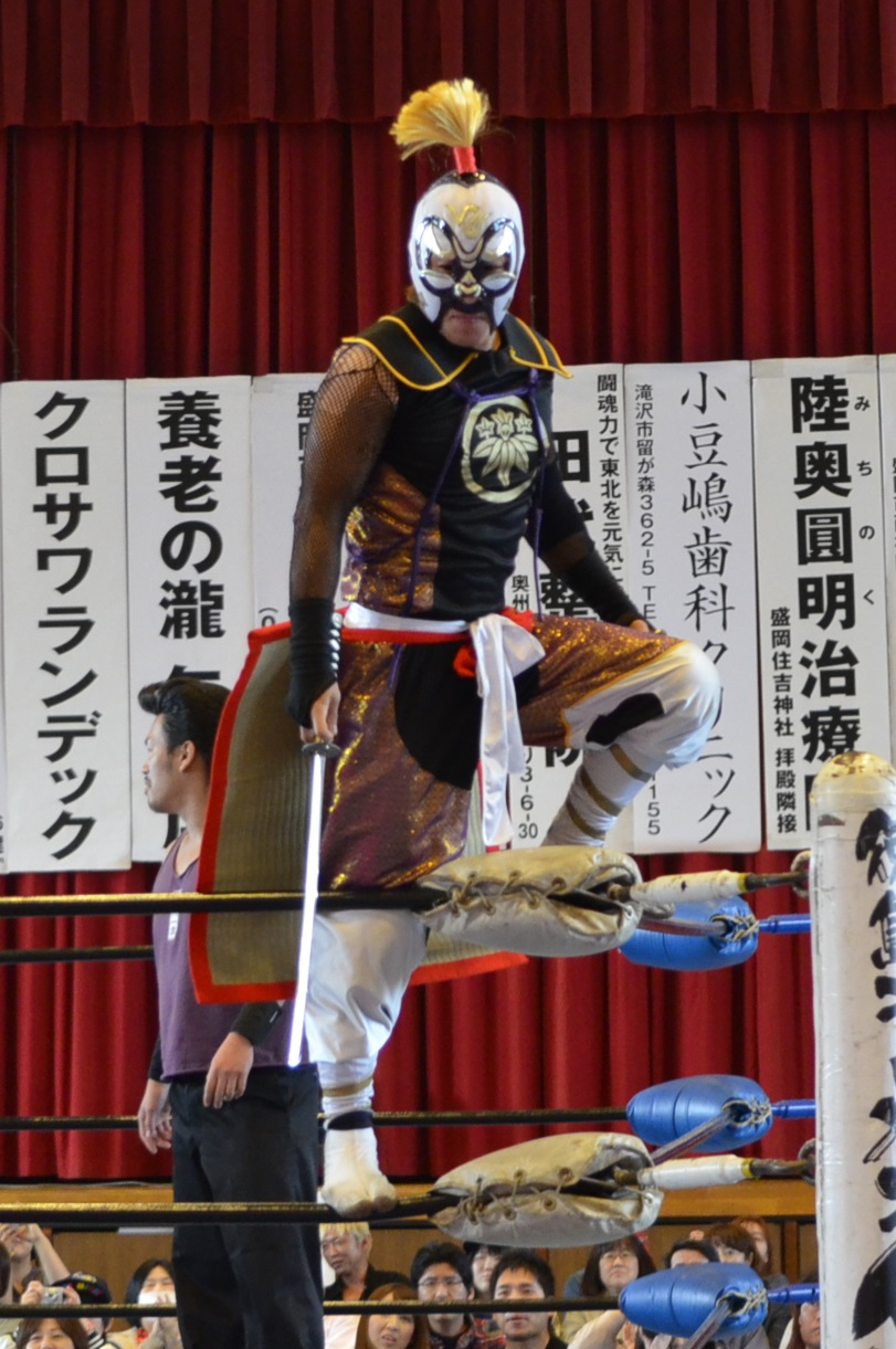 ’’’剣舞’’’